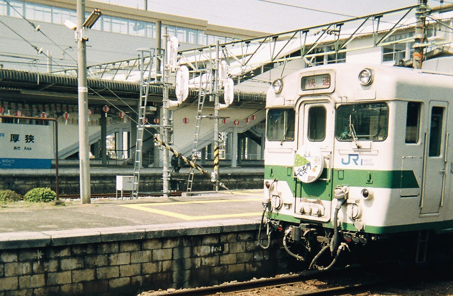 厚狭駅に停車中の美祢線快速キハ28「北長門」（1999年5月撮影）